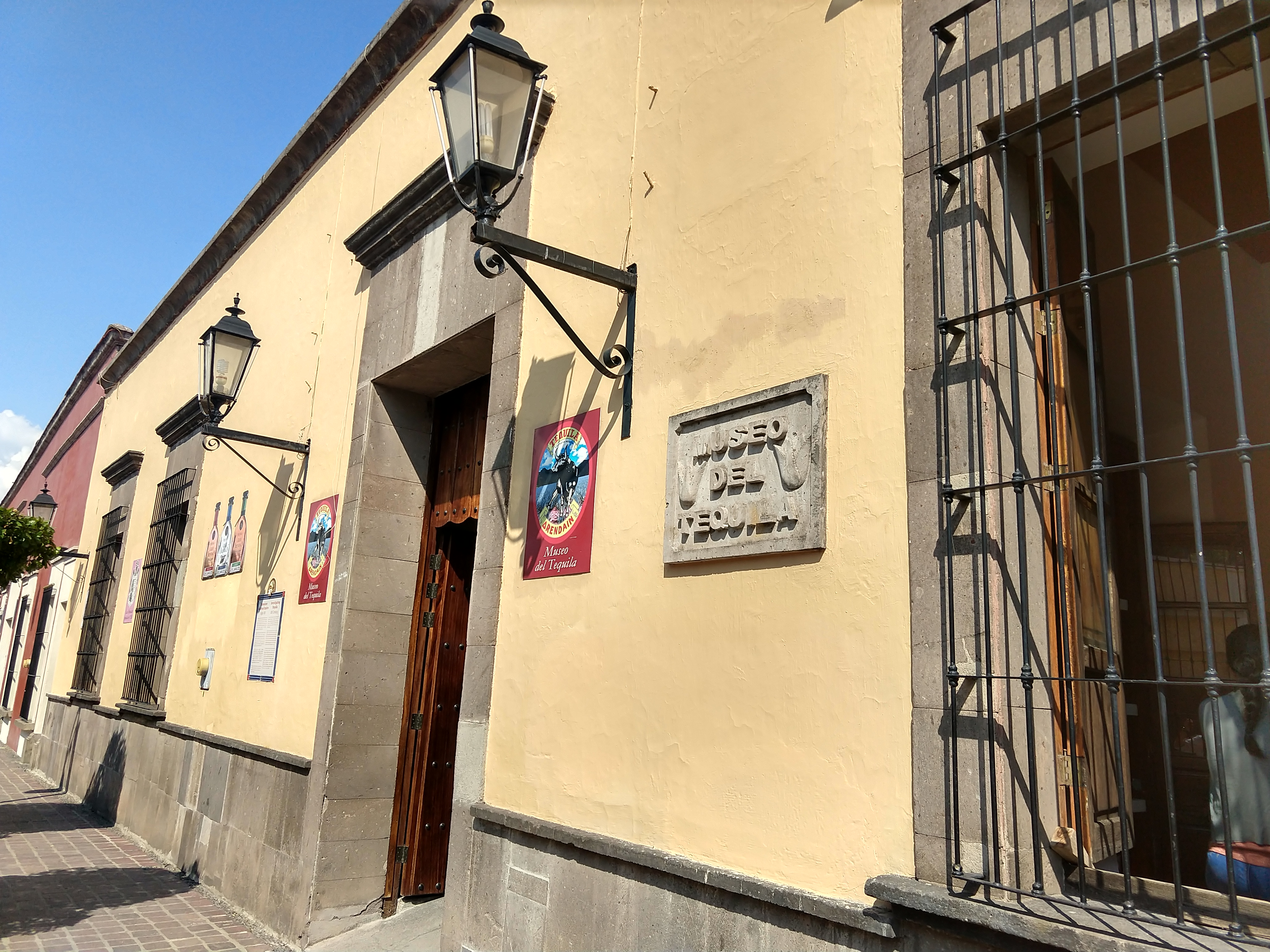 Museo Nacional de Tequila